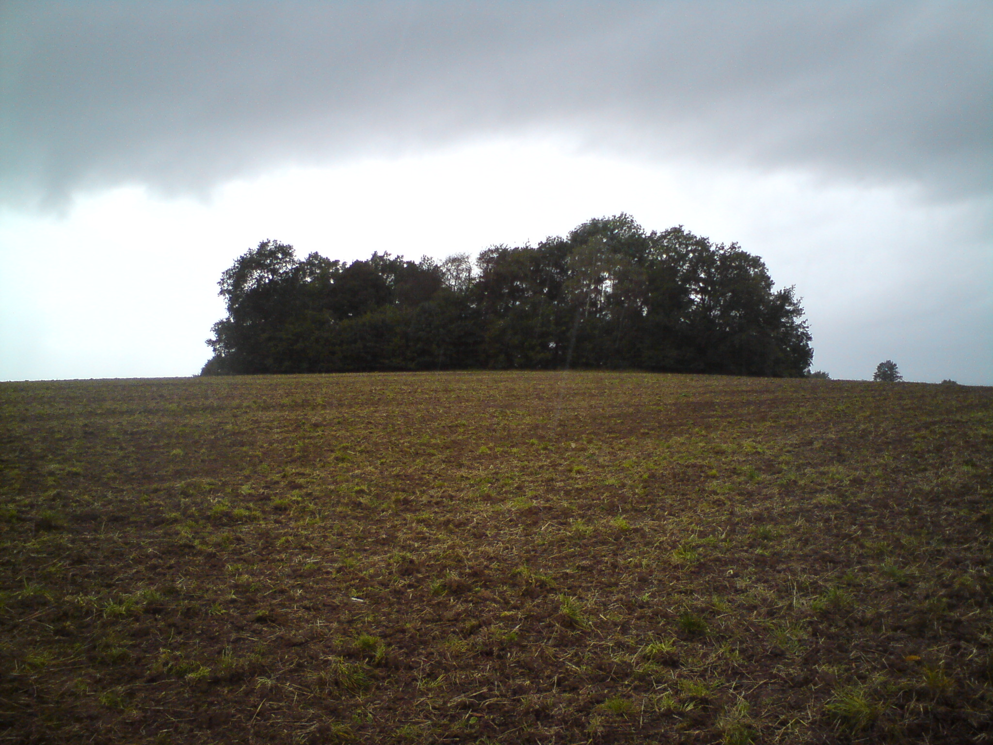 Pohled na Kantorovu horu u Jelma ze silnice na Lišov